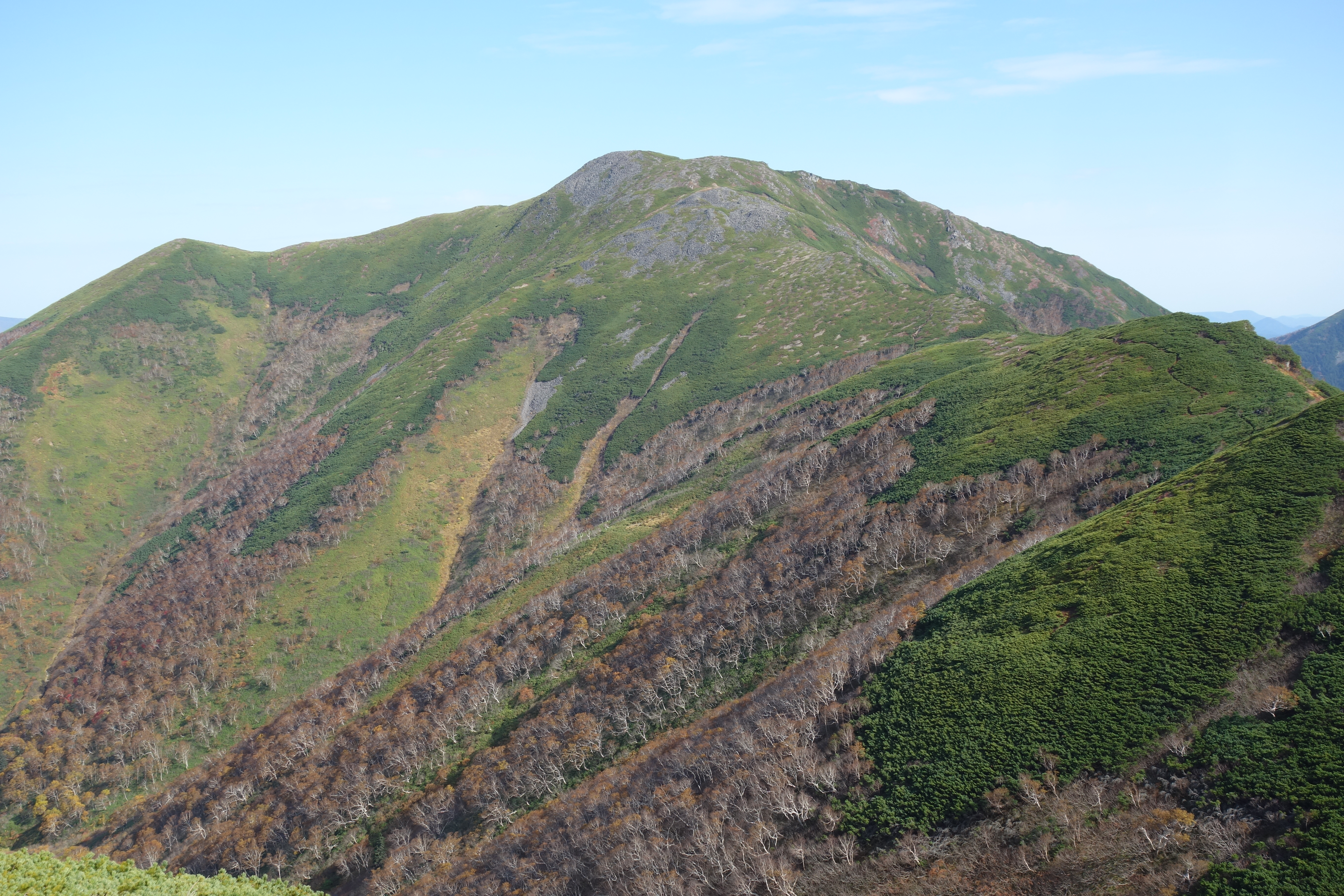 石狩の肩付近から見た音更山